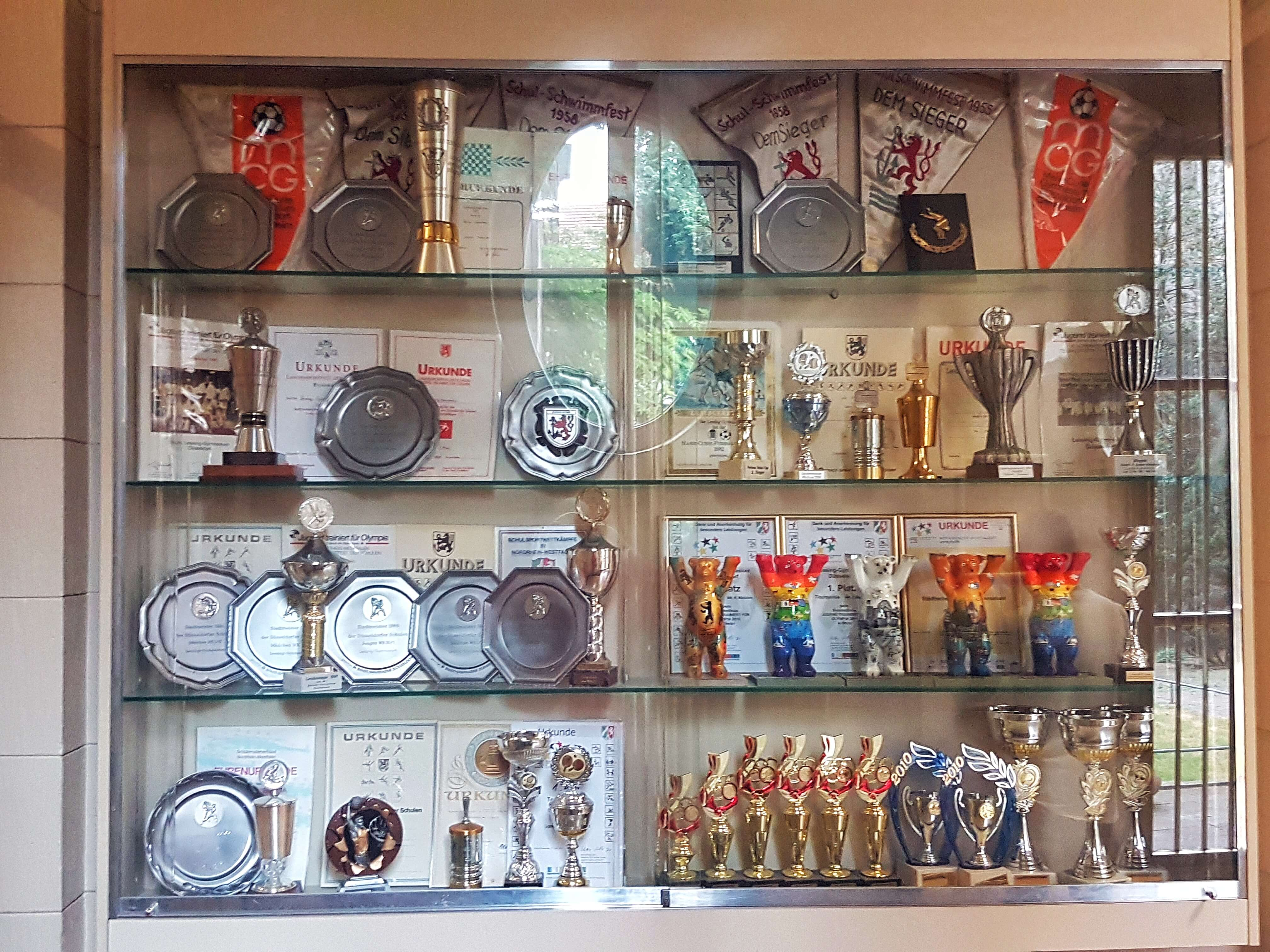 Sporttrophäen des Lessings